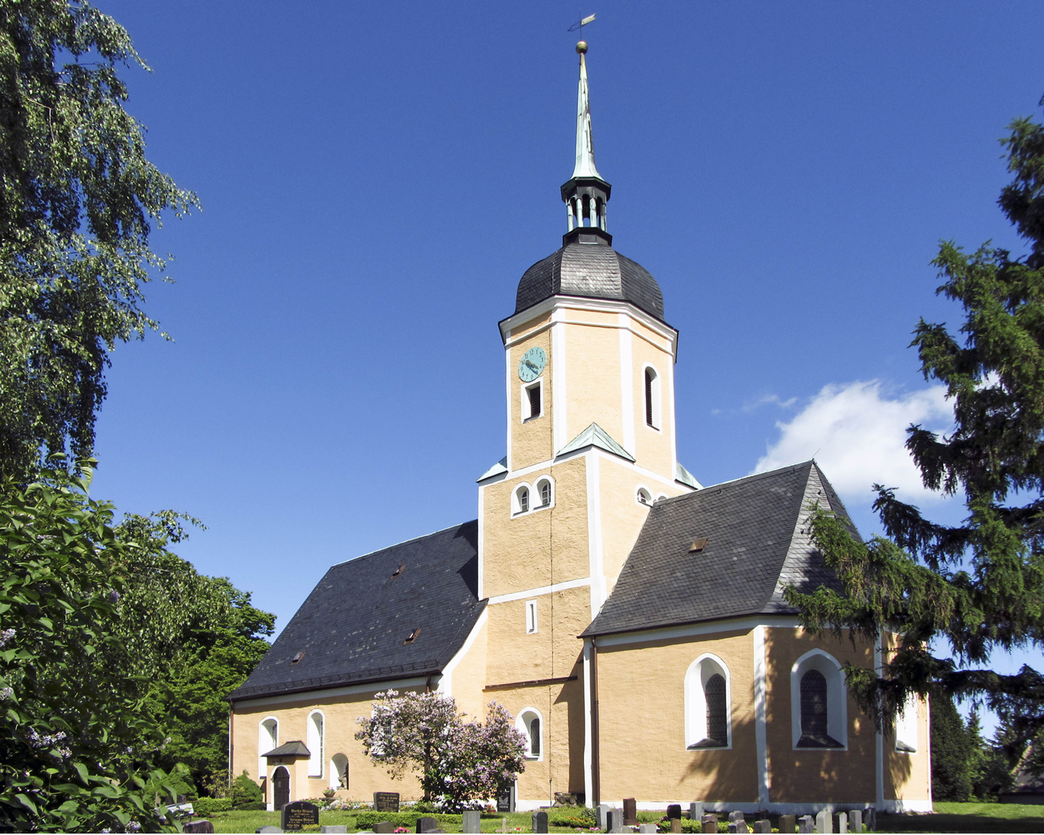 St. Nikolaus Kirche, Schulstraße 1 in Thallwitz OT Röcknitz